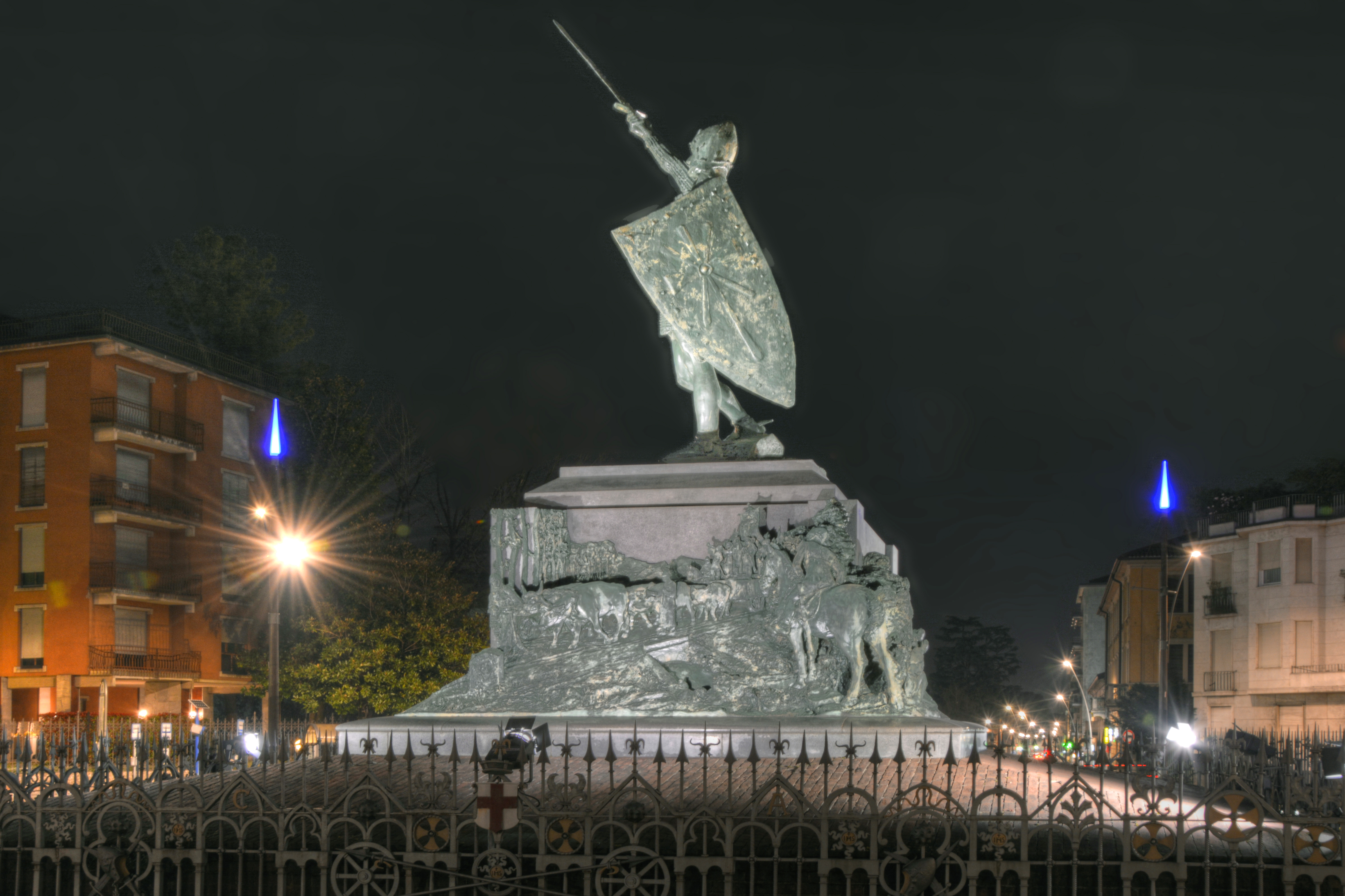 Monumento "Alberto da Giussano" This is a photo of a monument which is part of cultural heritage of Italy.